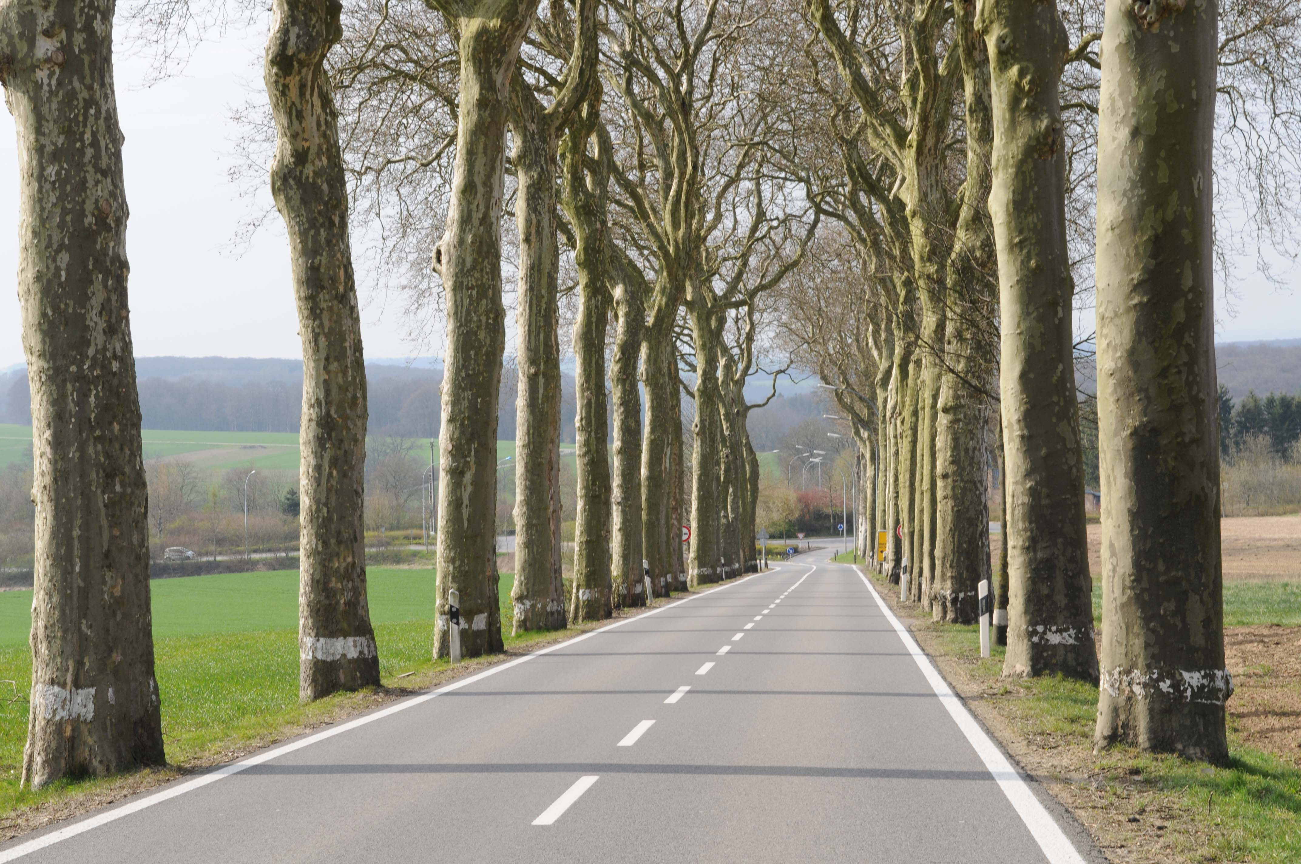 Alle um Quatre-Vents.